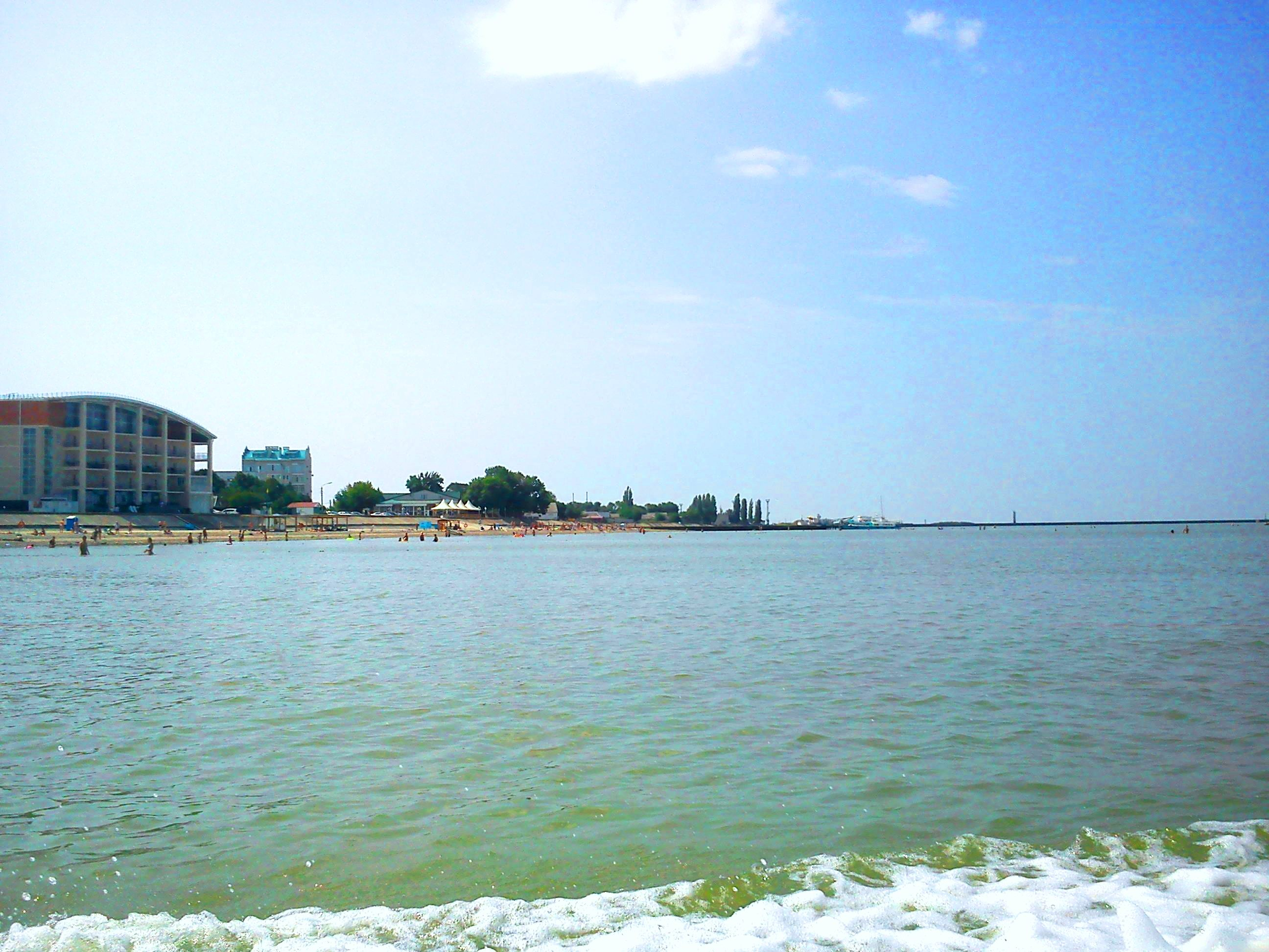 Вид с катера